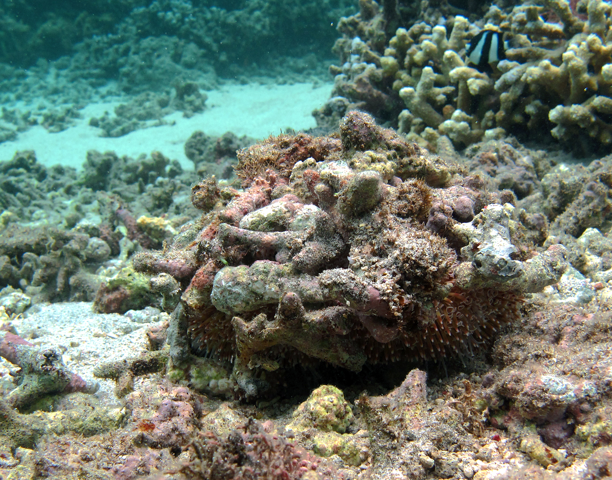 Un dangereux oursin-fleur (Toxopneustes pileolus) se camouflant dans le lagon de la Réunion.